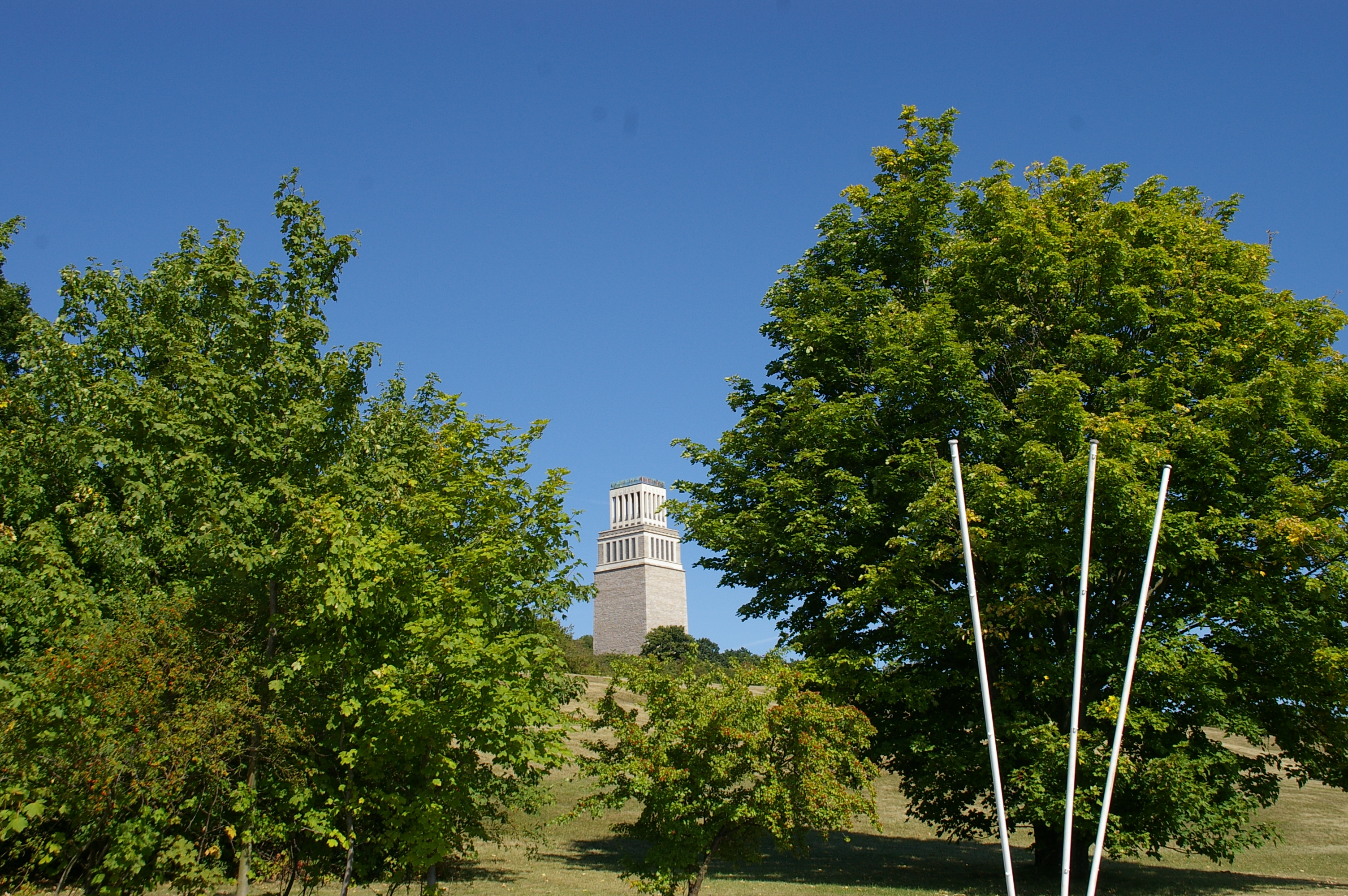 Mahnmal auf dem Ettersberg bei Weimar (KZ Buchenwald)